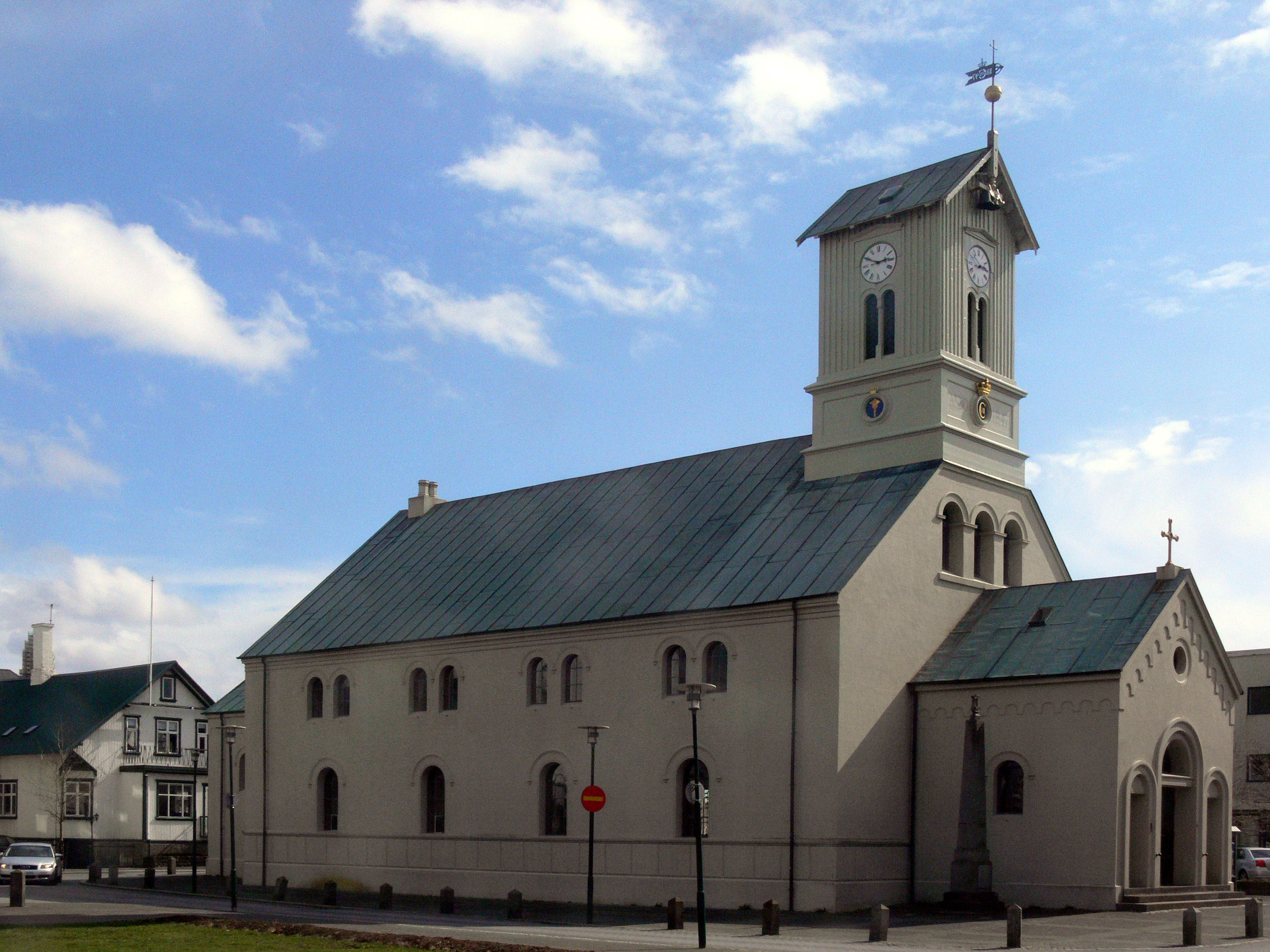 Dom zu Reykjavík. Architect: L.A. Winstrup (1815-1889)